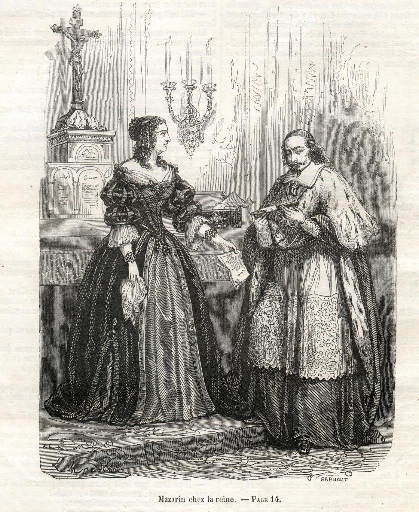 Cardinal Mazarin with the queen, illustration from The three musketeers.